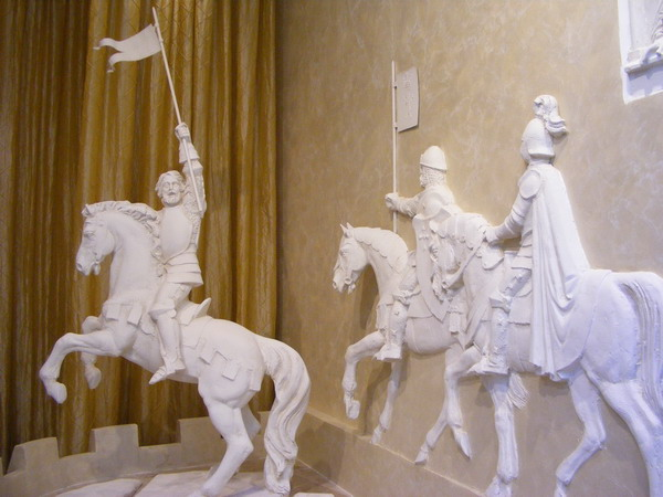 Statuete din Restaurantul Medieval Lionesse din Oradea